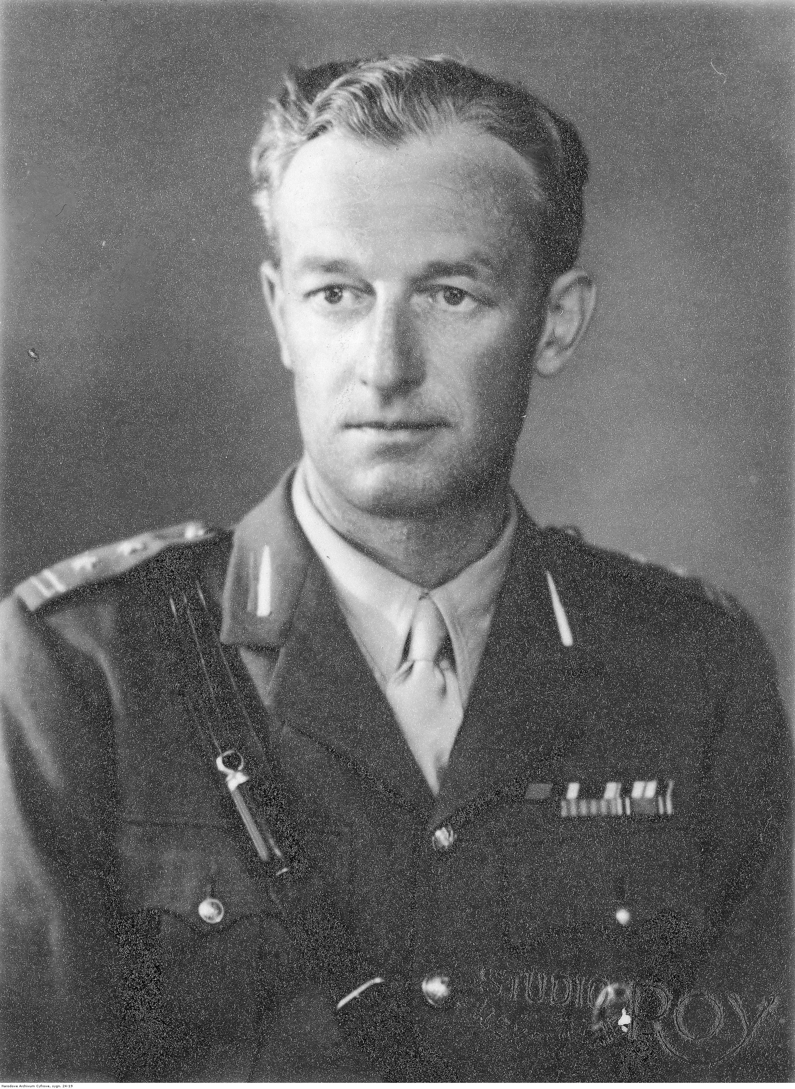 Adam Bieliński, podpułkownik, ostatni dowódca 15 Pułku Ułanów Poznańskich. Archiwum Fotograficzne Tadeusza Szumańskiego. Sygnatura: 24-19